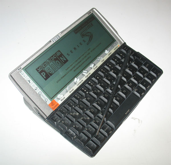 Psion Sries 5mx notebook